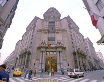 Bolsa de Valores de Lima (BVL) Bolsa de Valores de Lima (BVL)